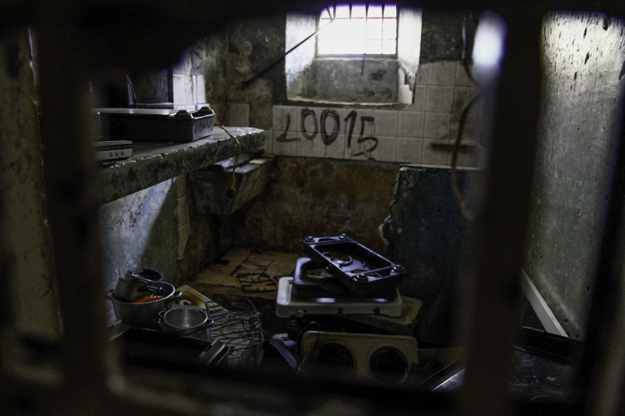 Quito, Ecuador, 20 dic (ANDES).- El Ministerio de Justicia, Derechos Humanos y Cultos presentó la exposición fotográfica "Espacios Verdes" cuyo escenario es el ex-Penal García Moreno. Esta exposición devela lo que dejaron las personas privadas de la libertad antes del cierre de este recinto carcelario. Foto: Micaela Ayala V./ANDES